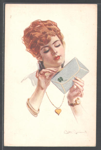 Rothaarige Frau öffnet gespannt den Liebesbrief